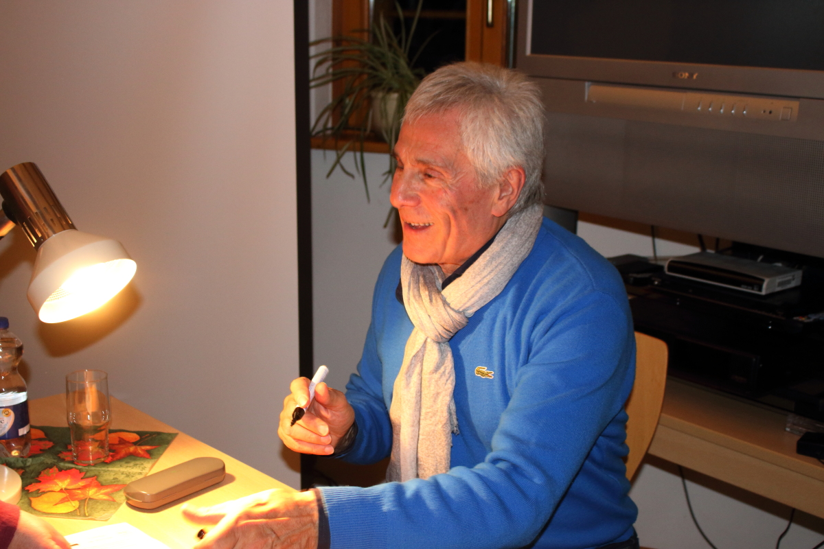 Fotografie des Schauspielers Gojko Mitić